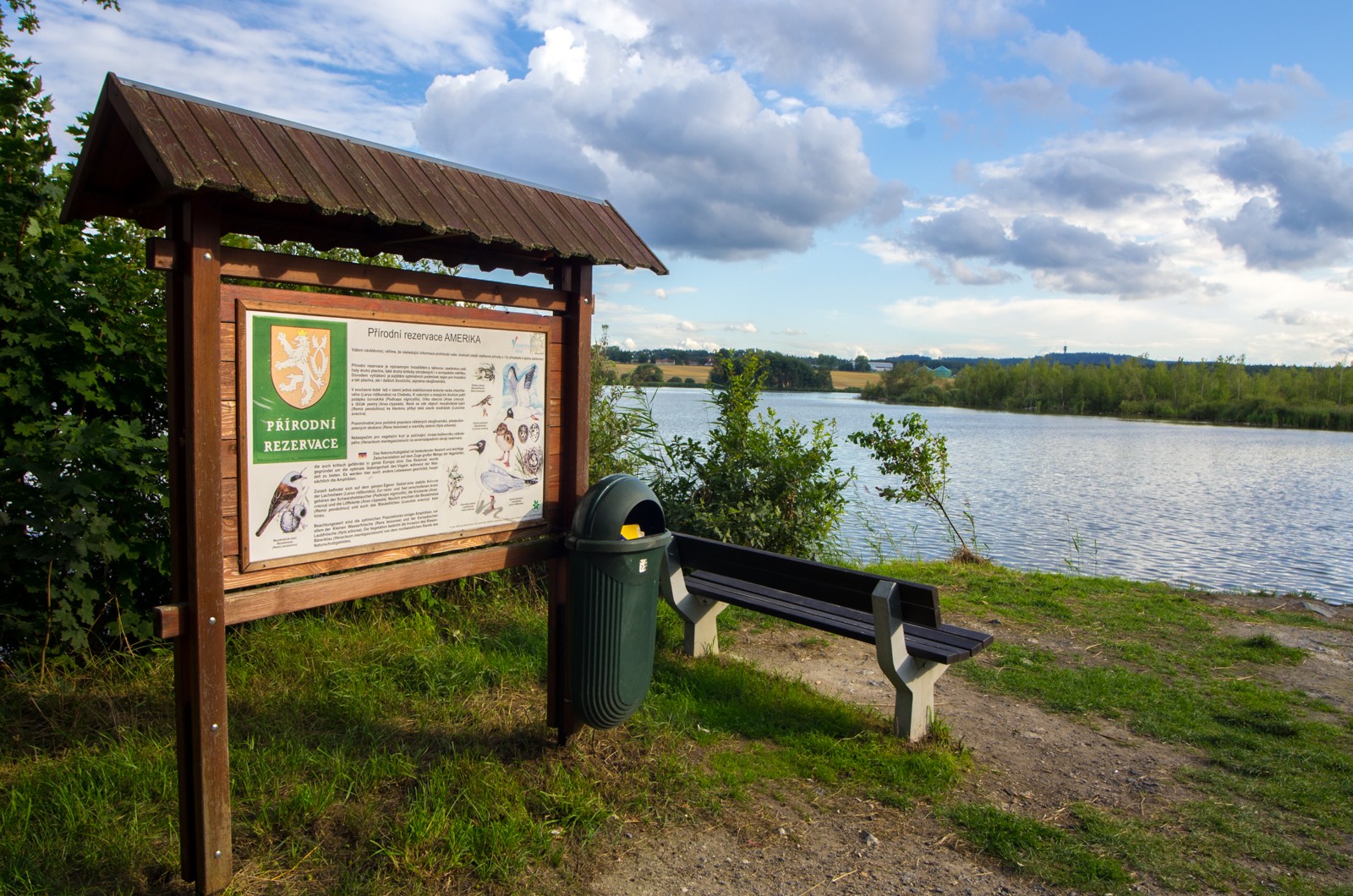 Přírodní rezervace Amerika, okres Cheb